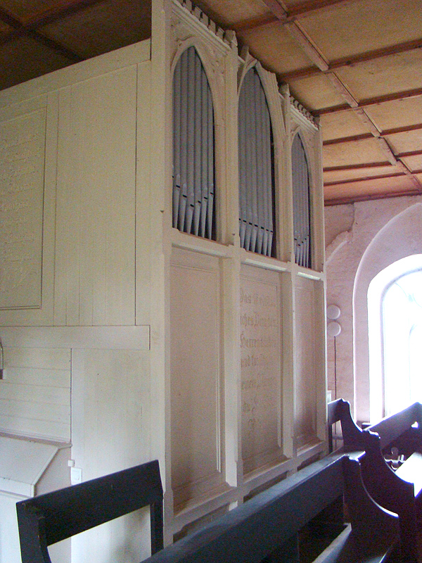 Orgel der Kirche in Faulenrost-Rittermannshagen